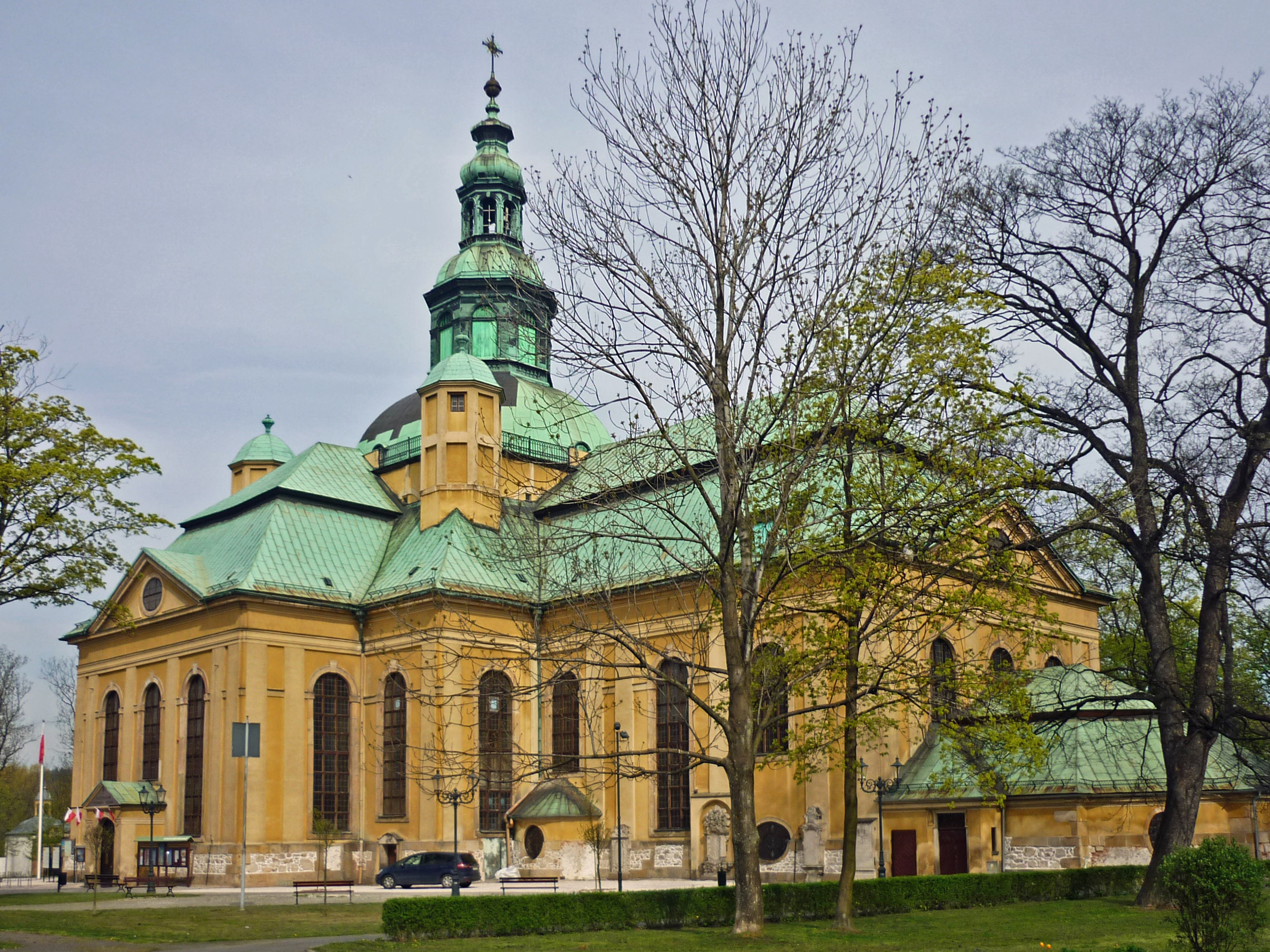 Ehem. evangelische Gnadenkirche "Zum Kreuz Christi" (Kościół Łaski) in Hirschberg (Jelenia Góra), jetzt katholische Kreuzerhöhungskirche (Kościół Podwyższenia Krzyża Świętego)